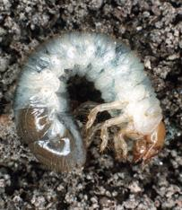 Japanese beetle larva.